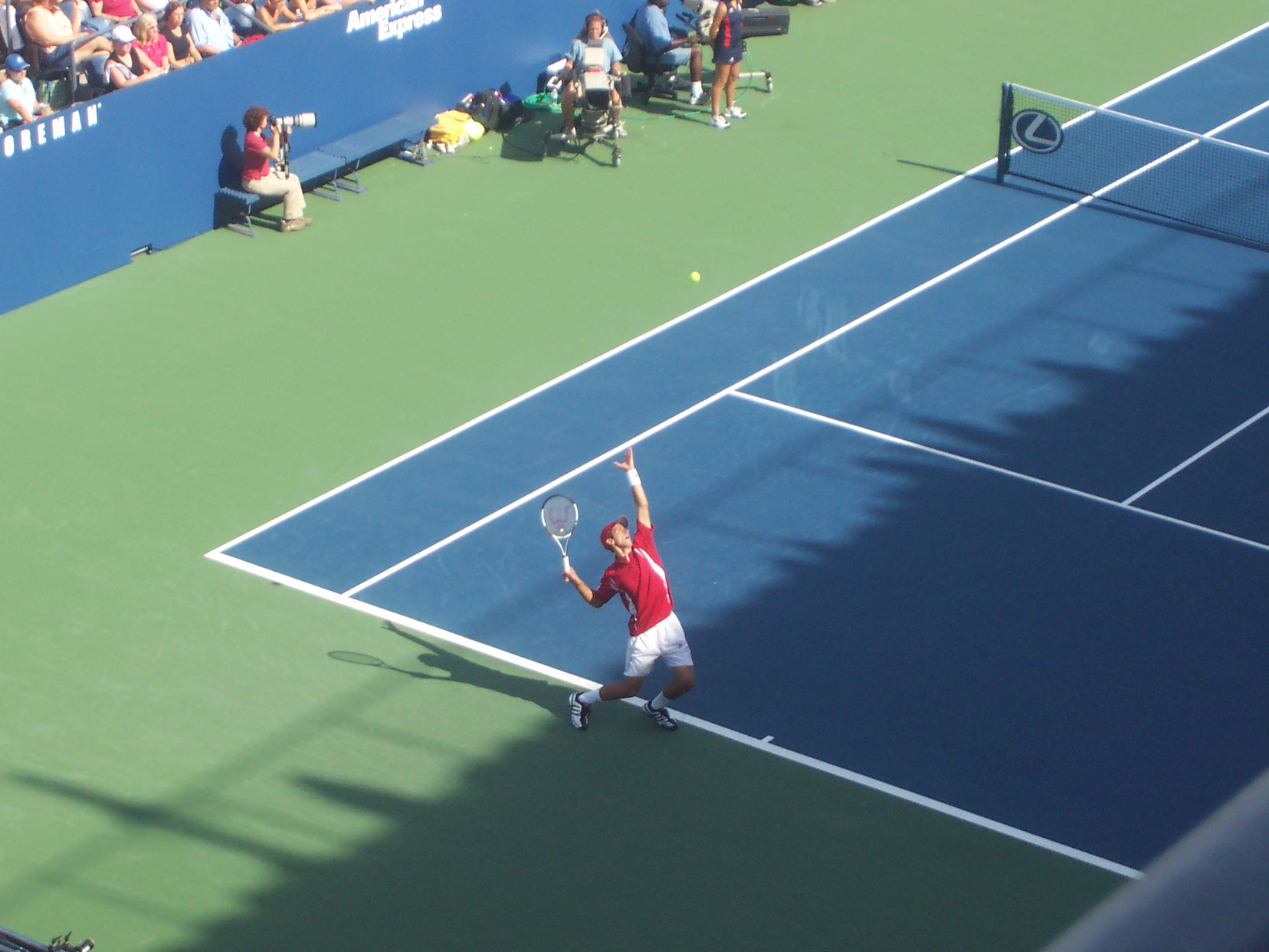 Novak Djokovic At The 2006 U.S. Open